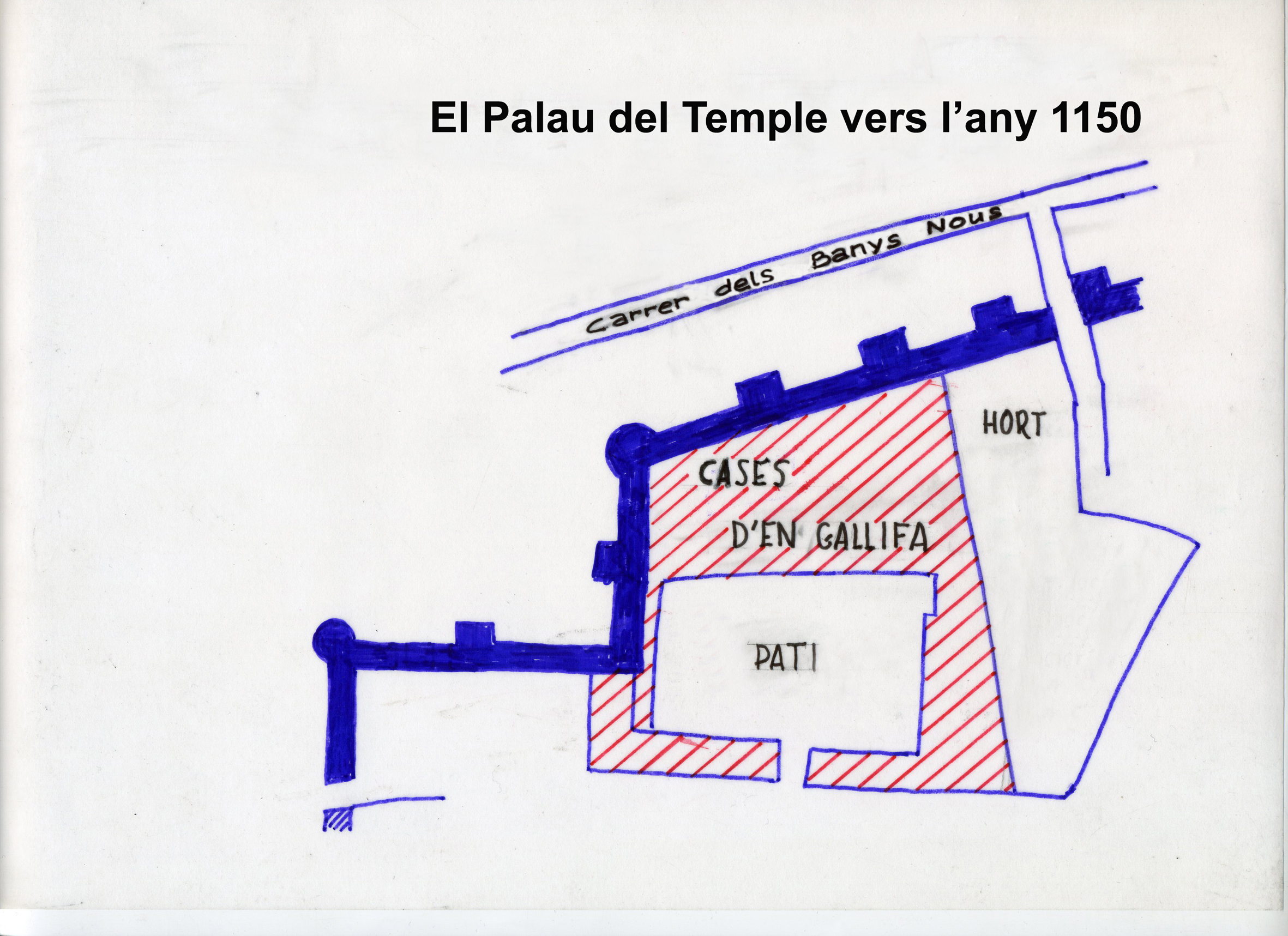 La casa de Palau vers els anys 1150. dib. J. Fuguet